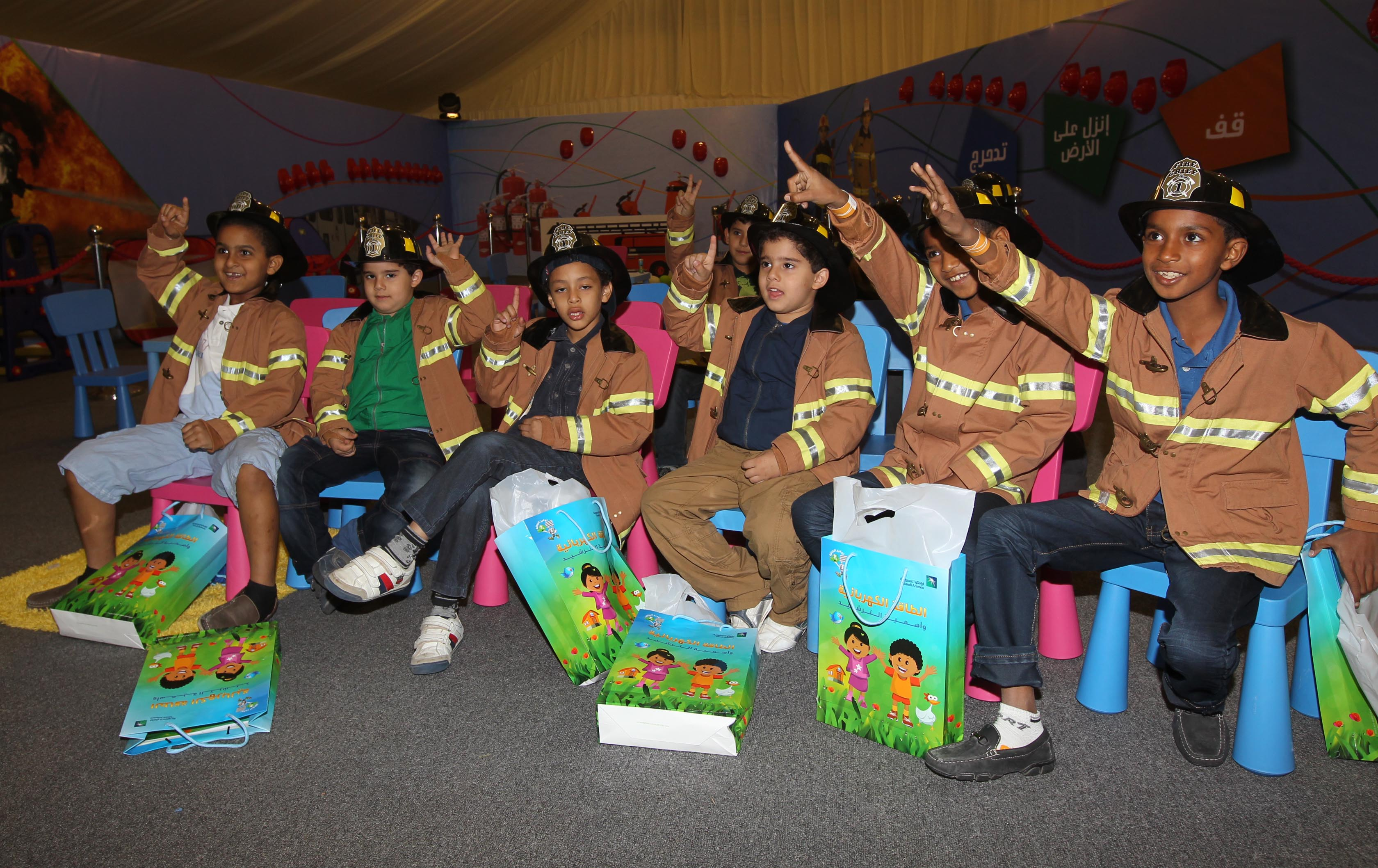 برنامج أرامكو السعودية الثقافي 2012